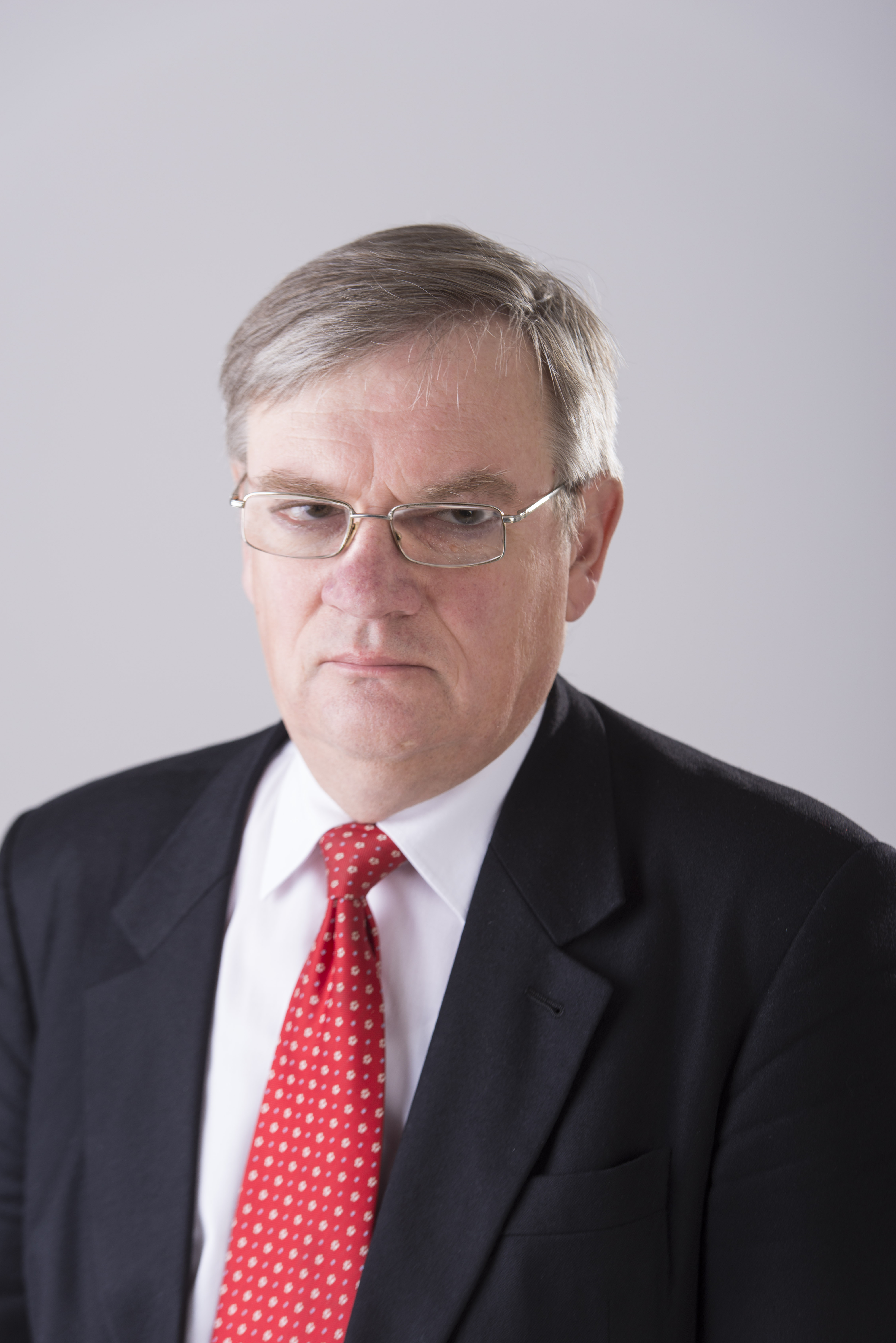 2014.gada 9.decembris. 12.Saeimas deputāts Romualds Ražuks. Foto: Reinis Inkēns, Saeimas Kanceleja Izmantošanas noteikumi: saeima.lv/lv/autortiesibas